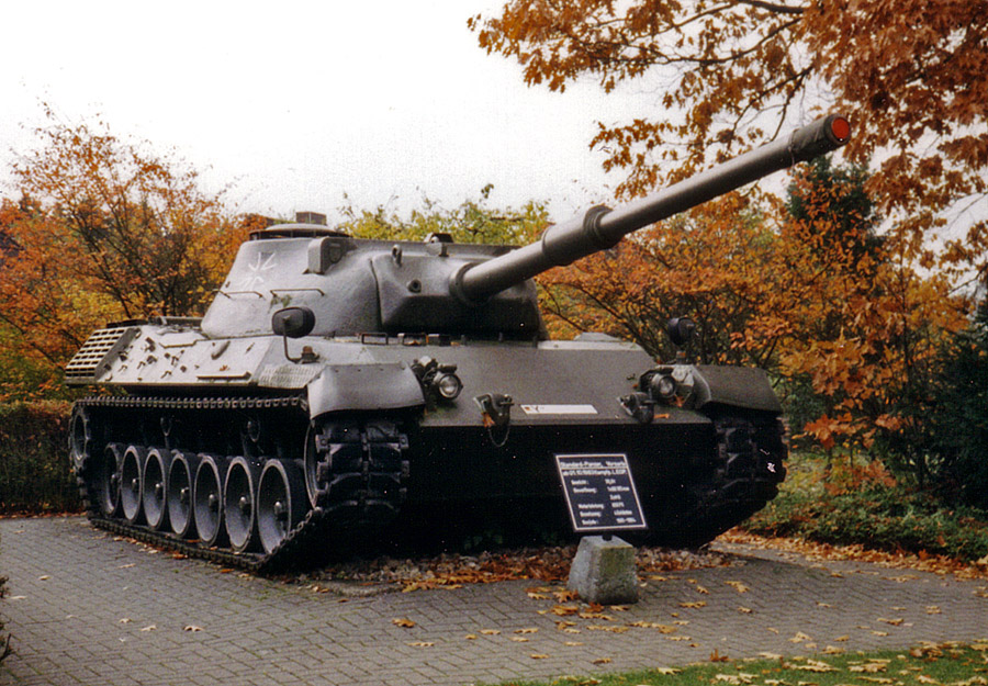 Beschreibung: Mittlerer Kampfpanzer Leopard 1 Wanne: Vorserie (1961-64) / Turm: Prototyp II A (1961) ausgestellt im Panzermuseum Munster